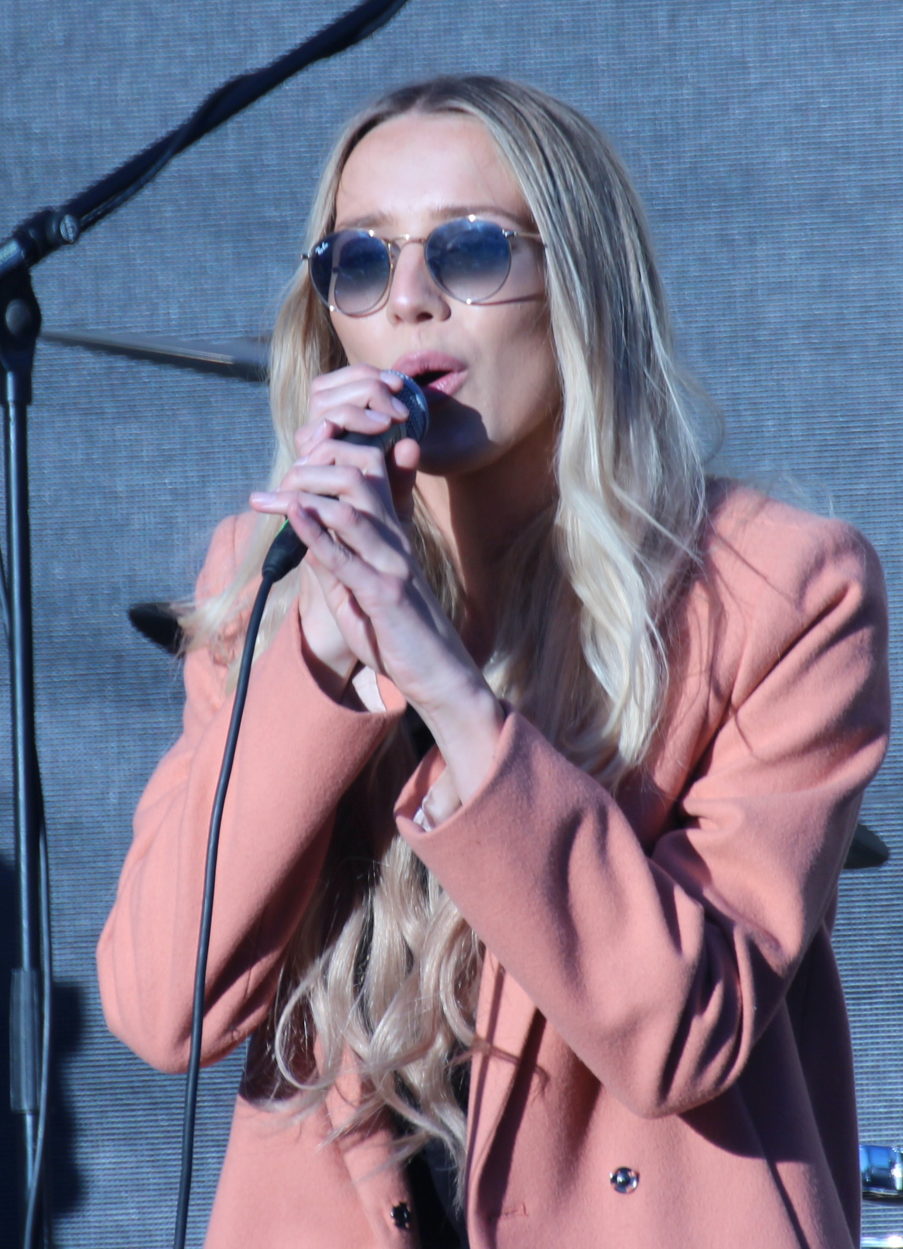 Liis Lemsalu esinemas Tallinnas Vabaduse väljakul Euroopa päeval